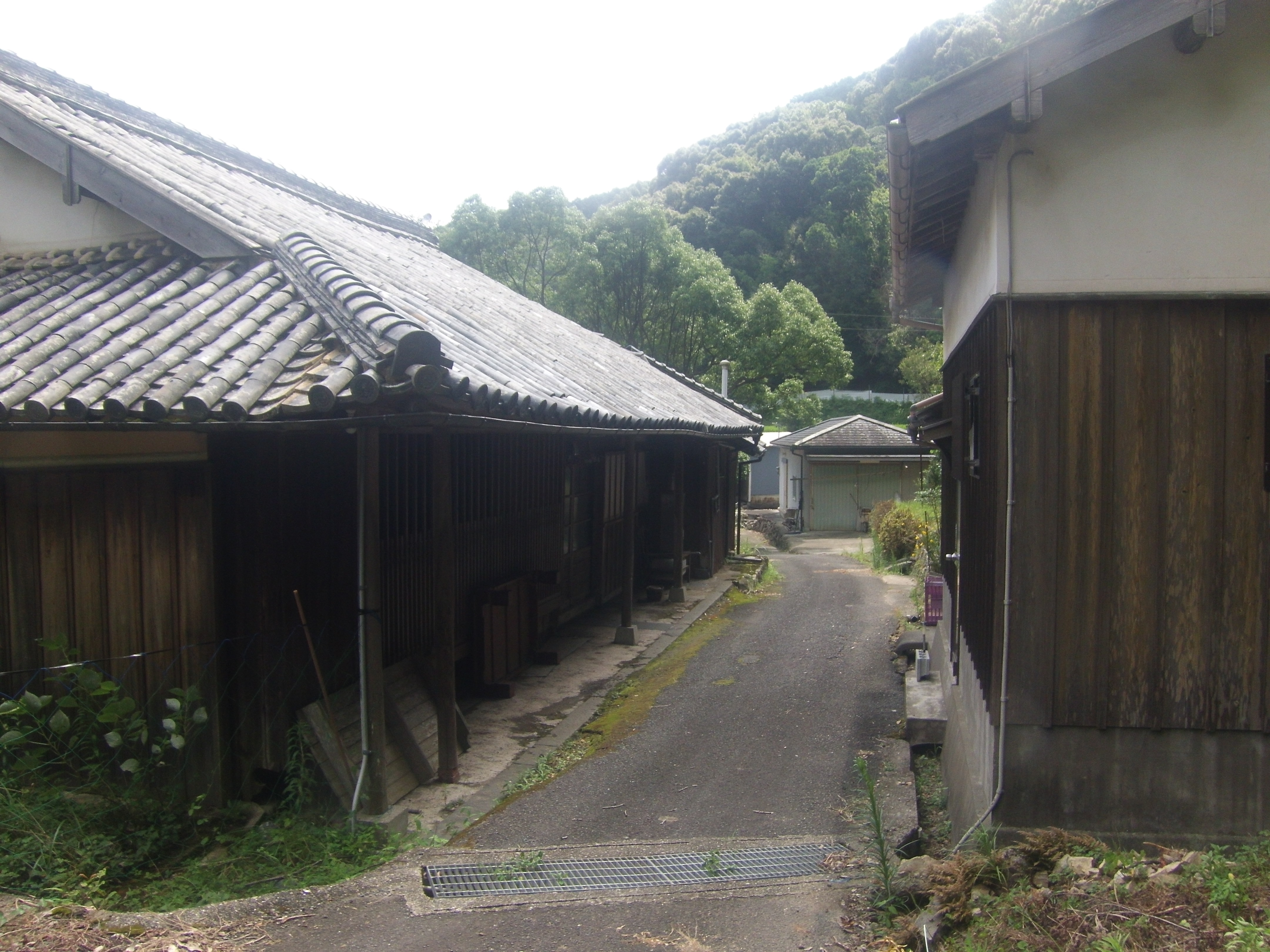 熊野古道・紀伊路が抜ける原谷集落の古民家